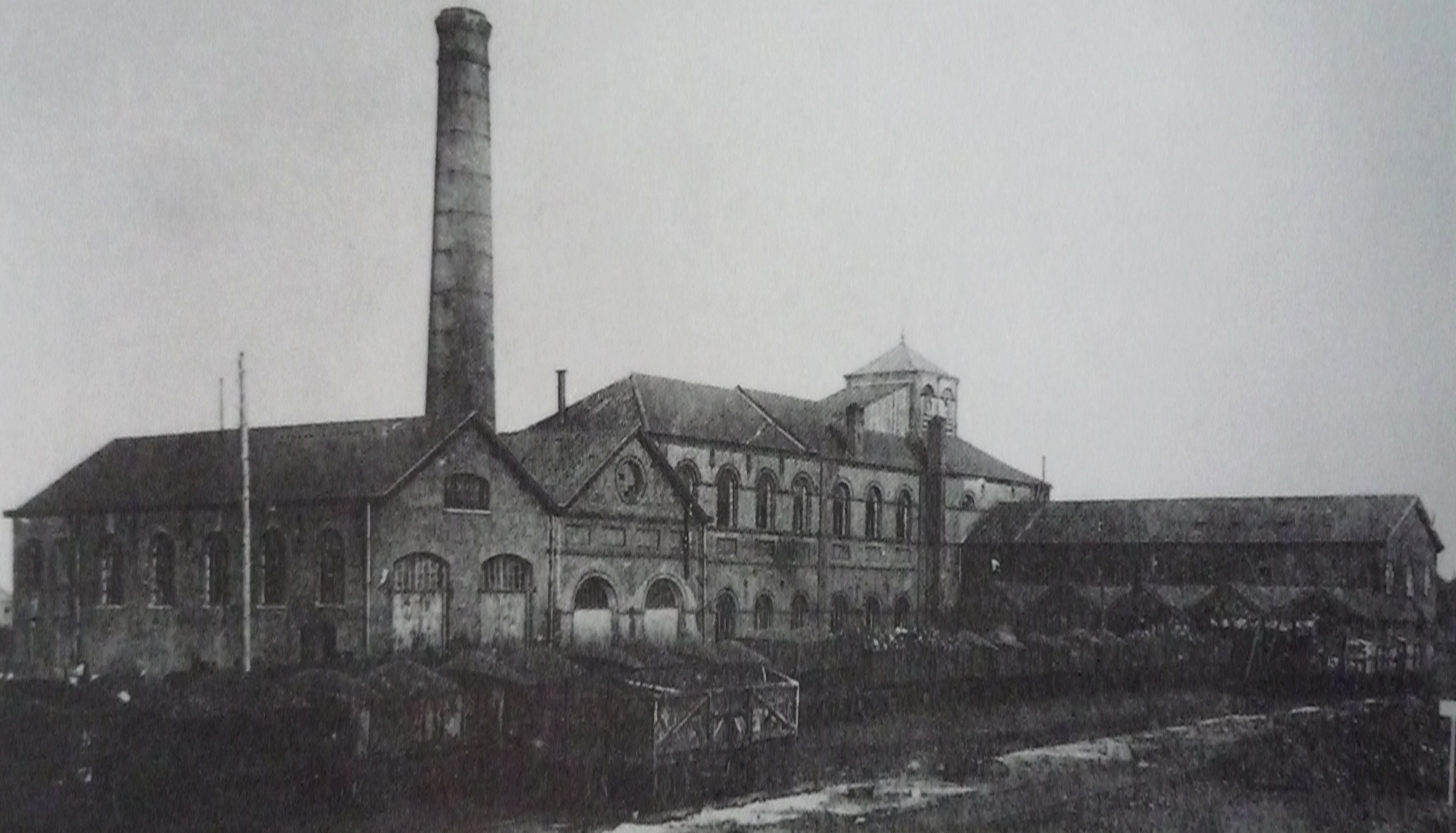 La Fosse n° 1 de la Compagnie des mines de Meurchin était un charbonnage constitué d'un seul puits situé à Bauvin, Nord, Nord-Pas-de-Calais, France.